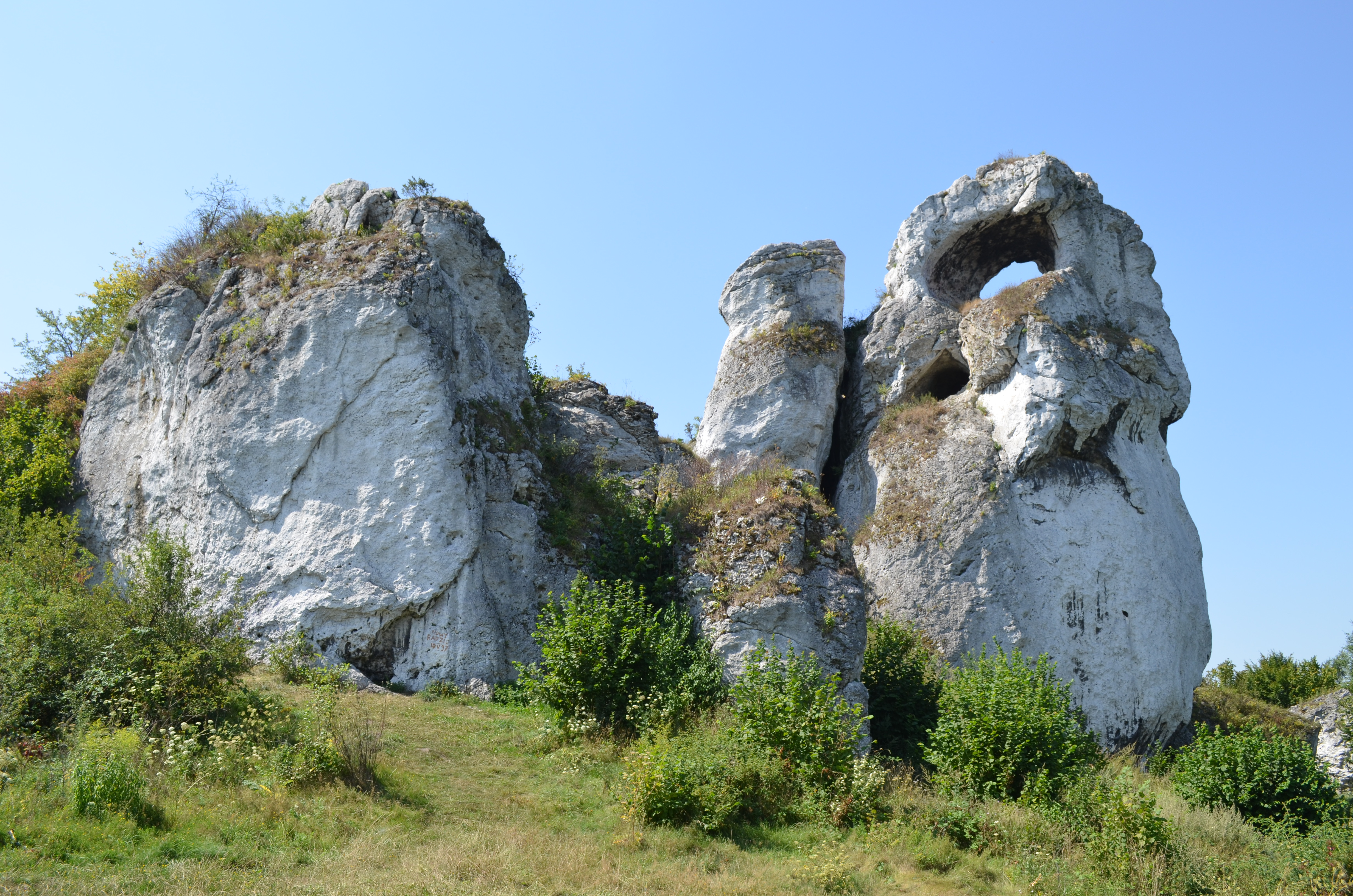 Okiennik Wielki, okolice Piaseczna (woj. śląskie)